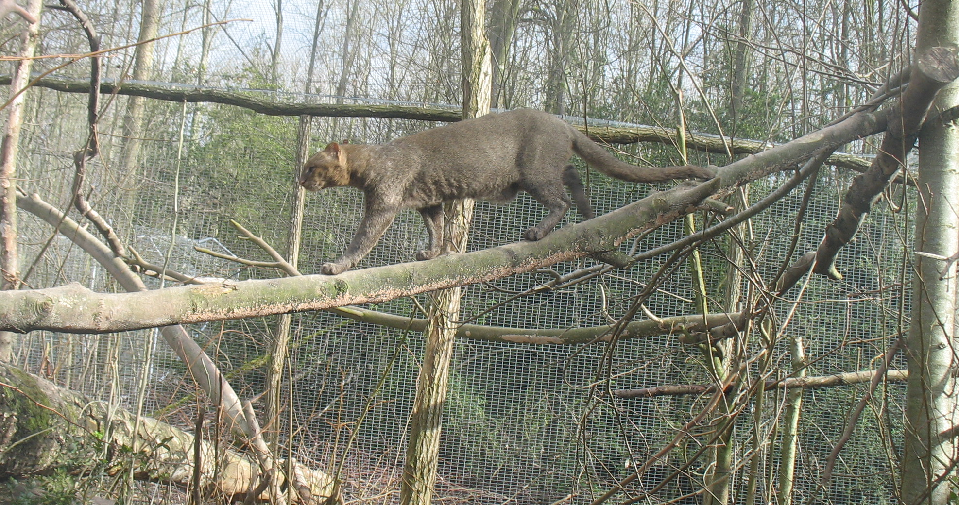 Un jaguarondi (Puma yaguarondi) du Parc des Félins